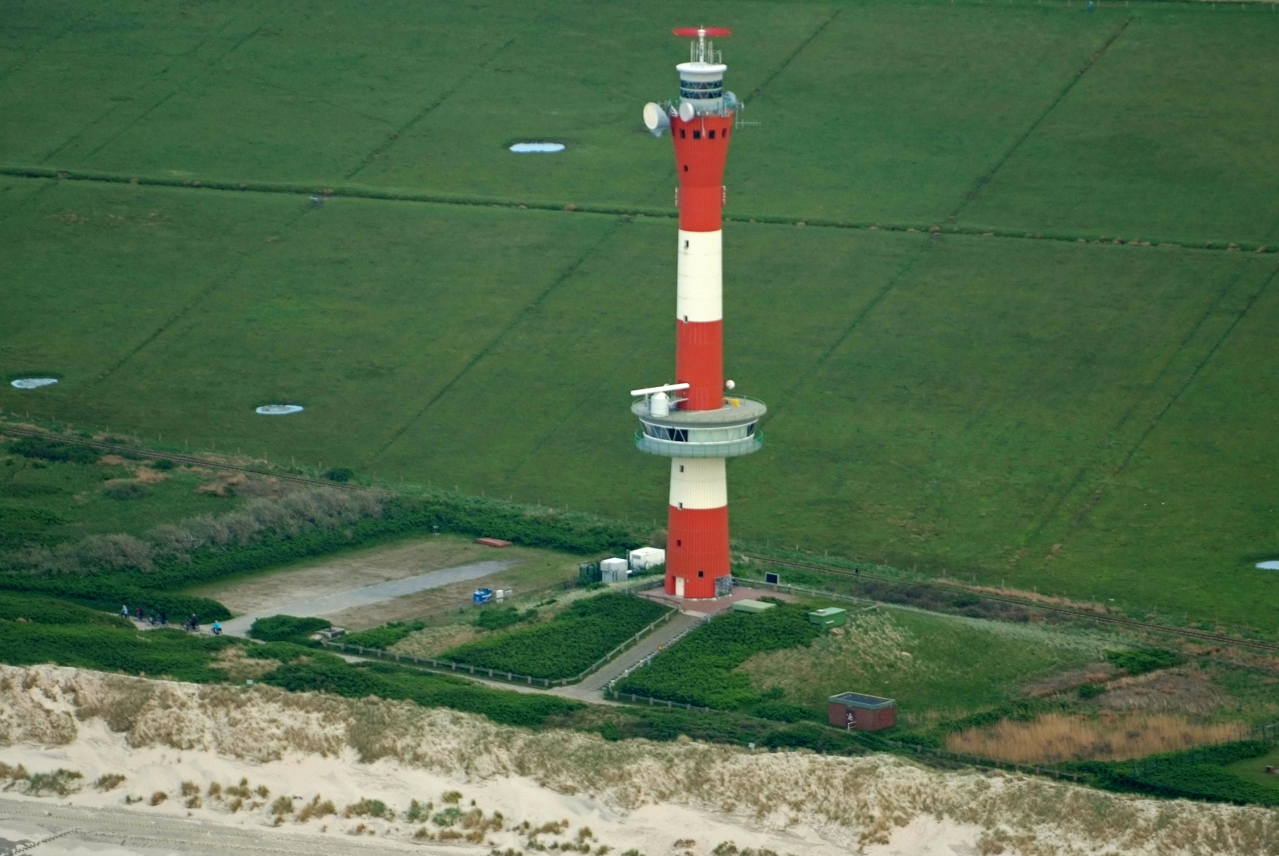 Fotoflug vom Flugplatz Nordholz-Spieka über Bremerhaven, Wilhelmshaven und die Ostfriesischen Inseln bis Borkum Neuer Leuchtturm Wangerooge